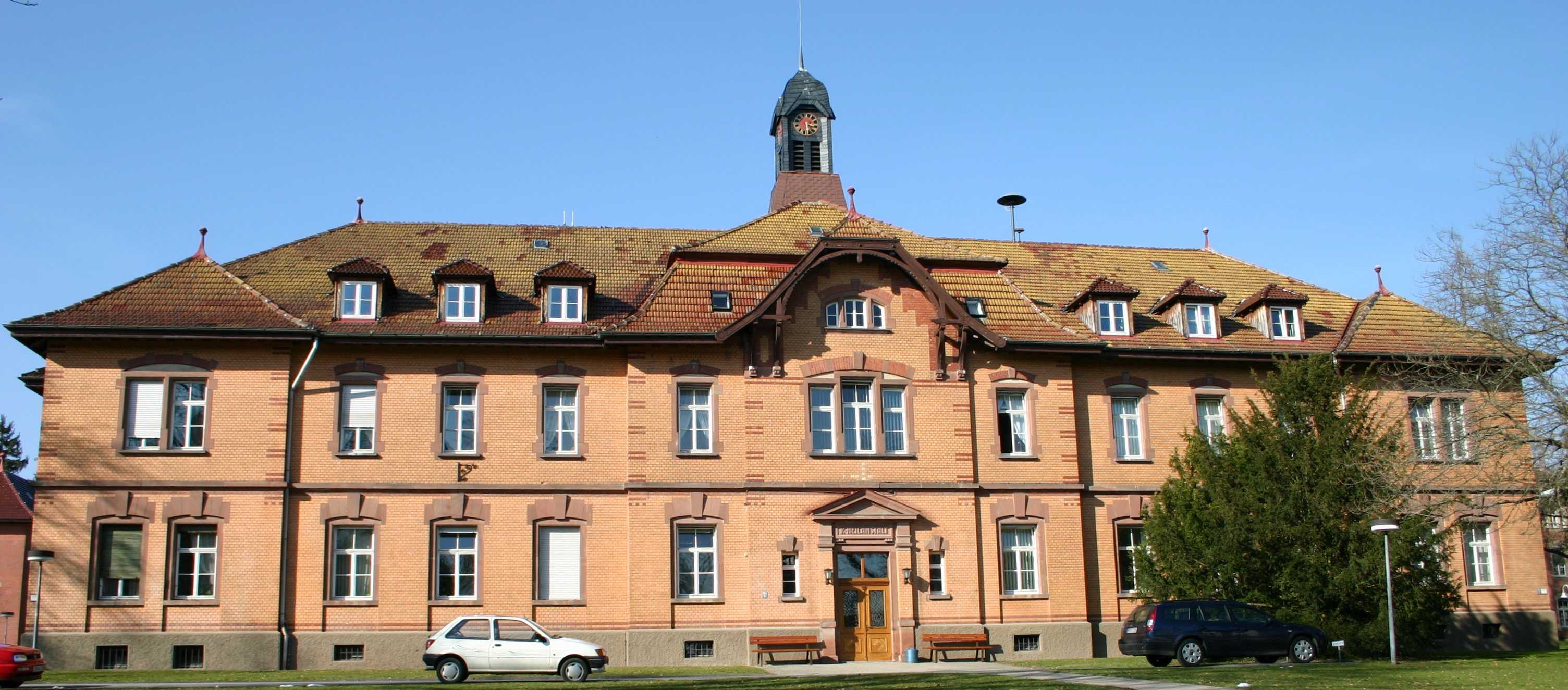 Klinikum am Weissenhof, Verwaltungsgebäude, Südansicht